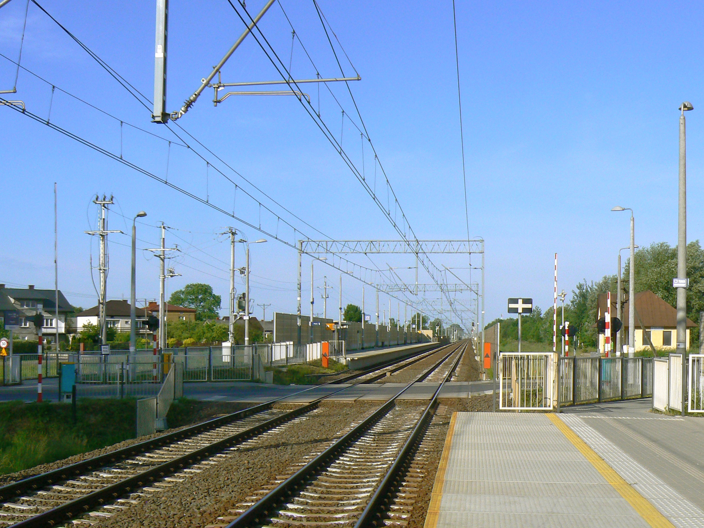 Przystanek kolejowy w Chrzęsnem (woj, mazowieckie). Widok w kierunku Warszawy (rok 2017)